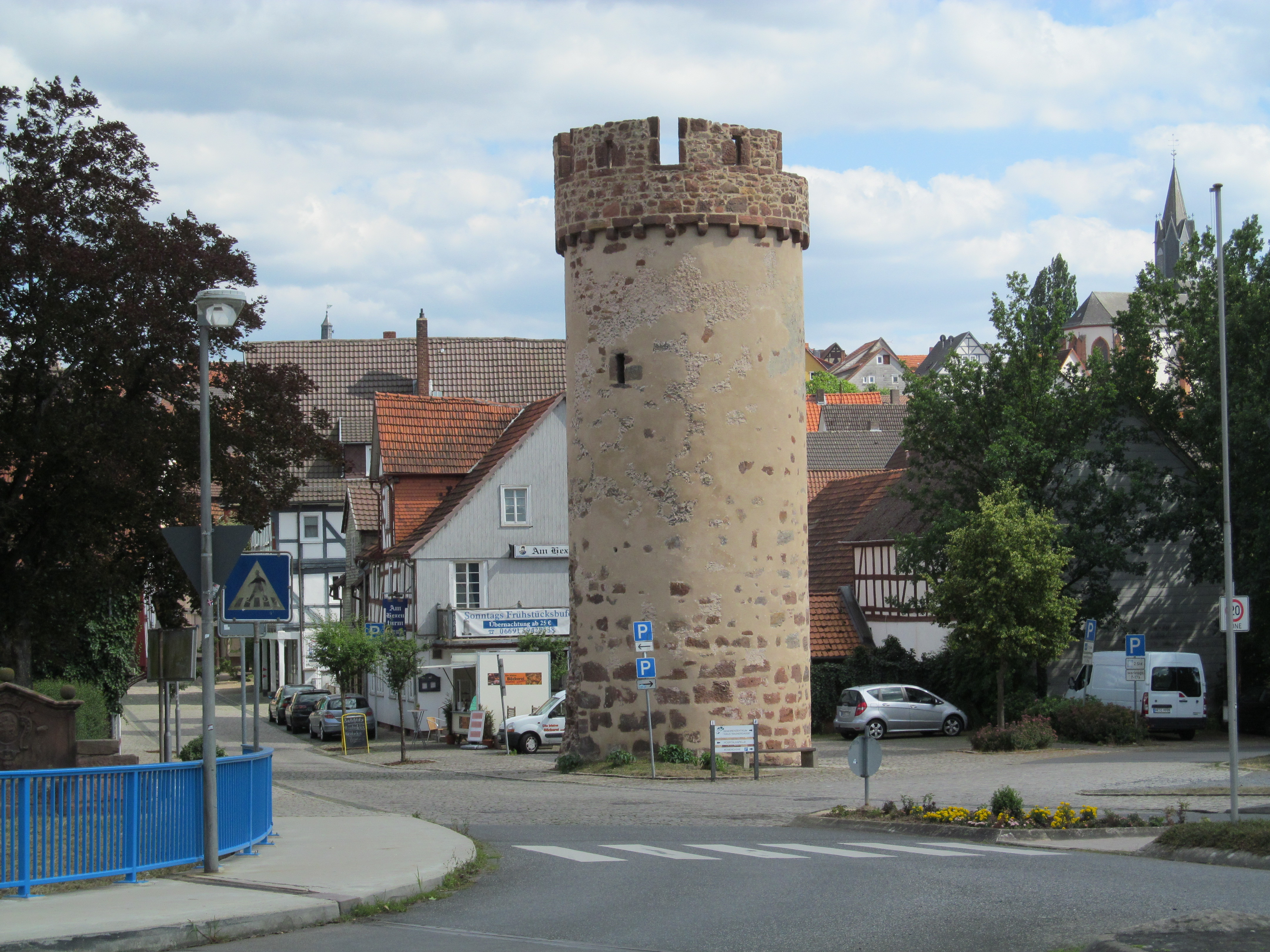 der Hexenturm am westlichen Ende der Steingasse